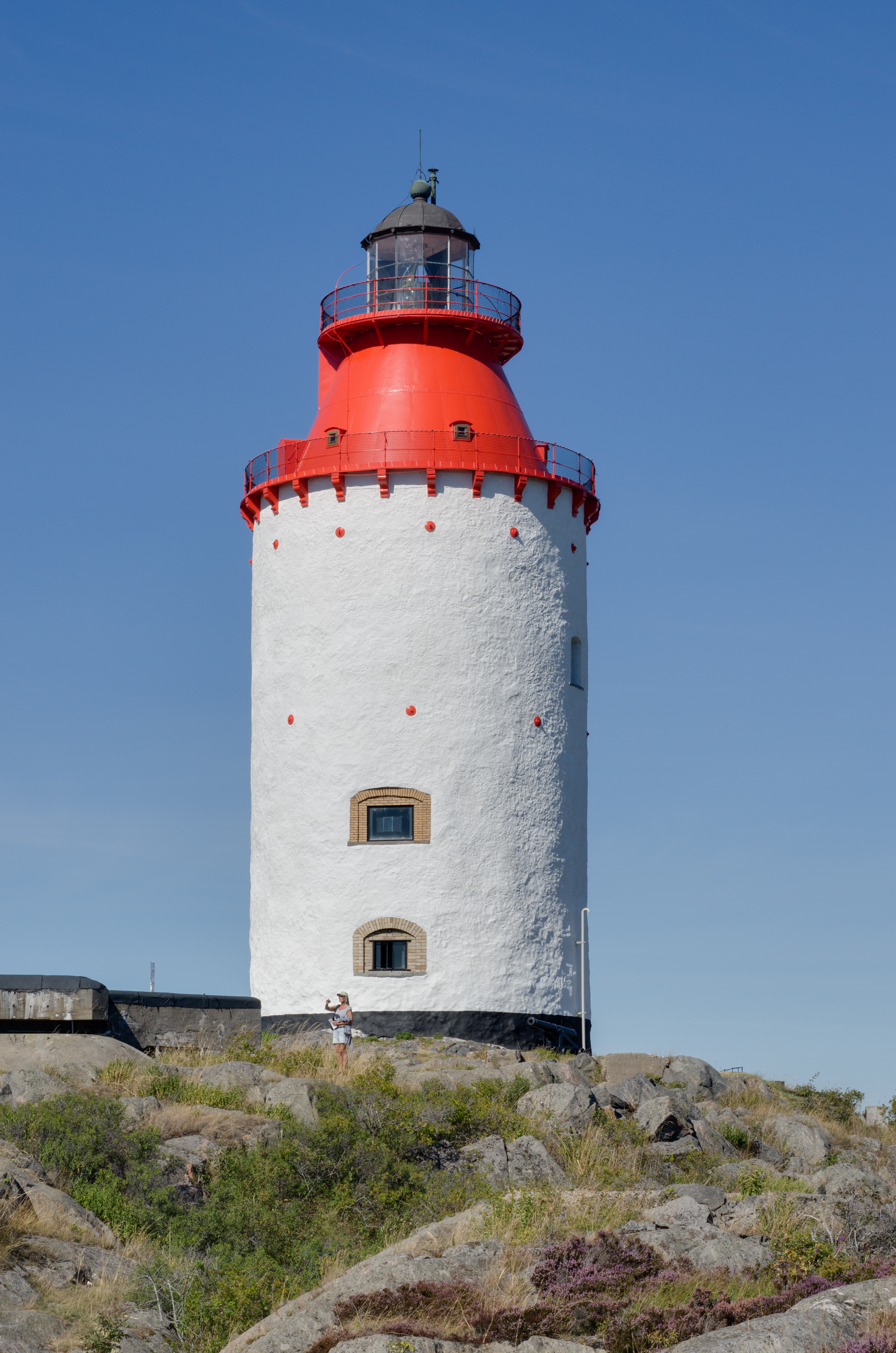 Landsort Lighthouse, Öja Island, Stockholm archipelago.